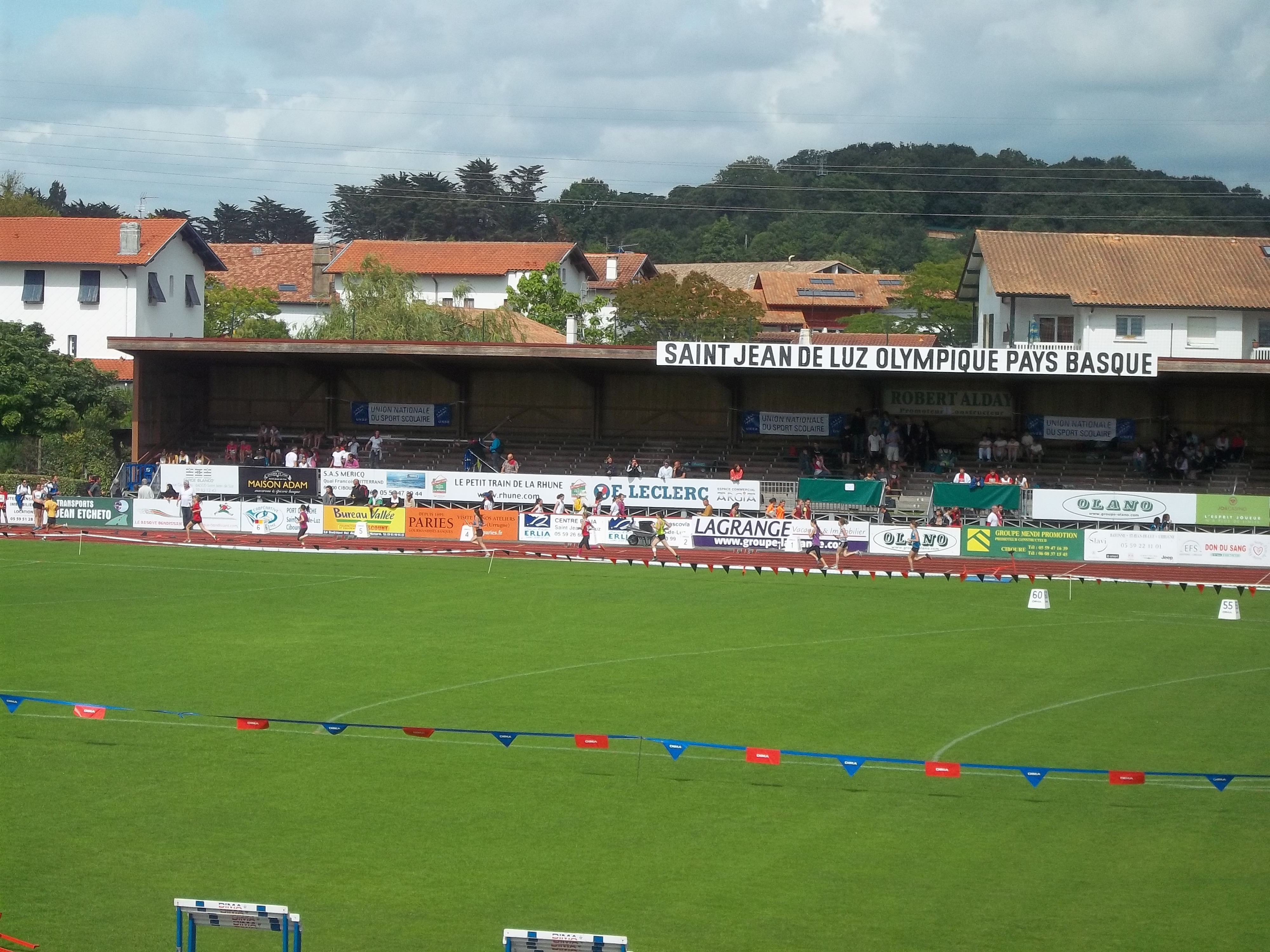 Vue sur une des tribunes du stade du Pavillon bleu.